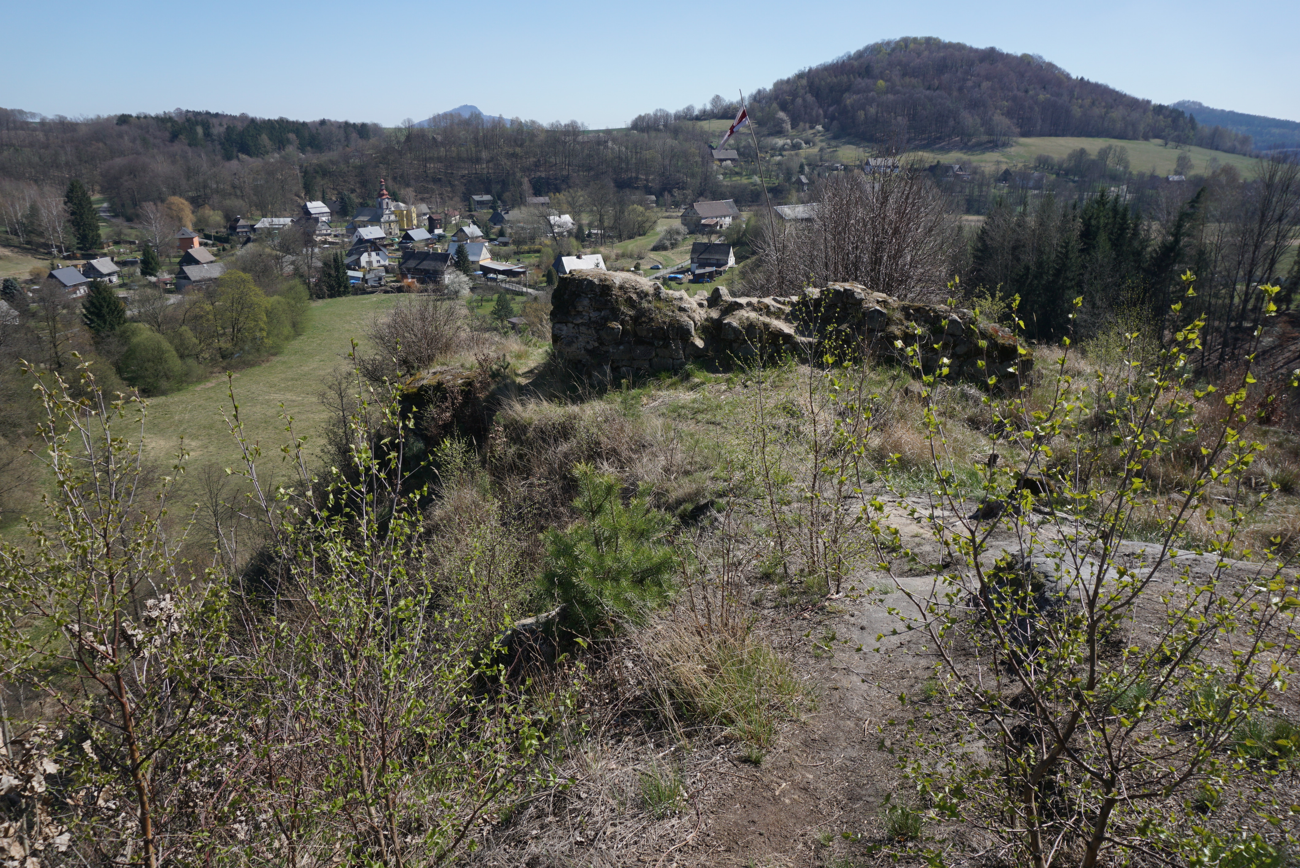 Tvrz Velenice, les nahoře ve skalách za obcí, Velenice (okres Česká Lípa).